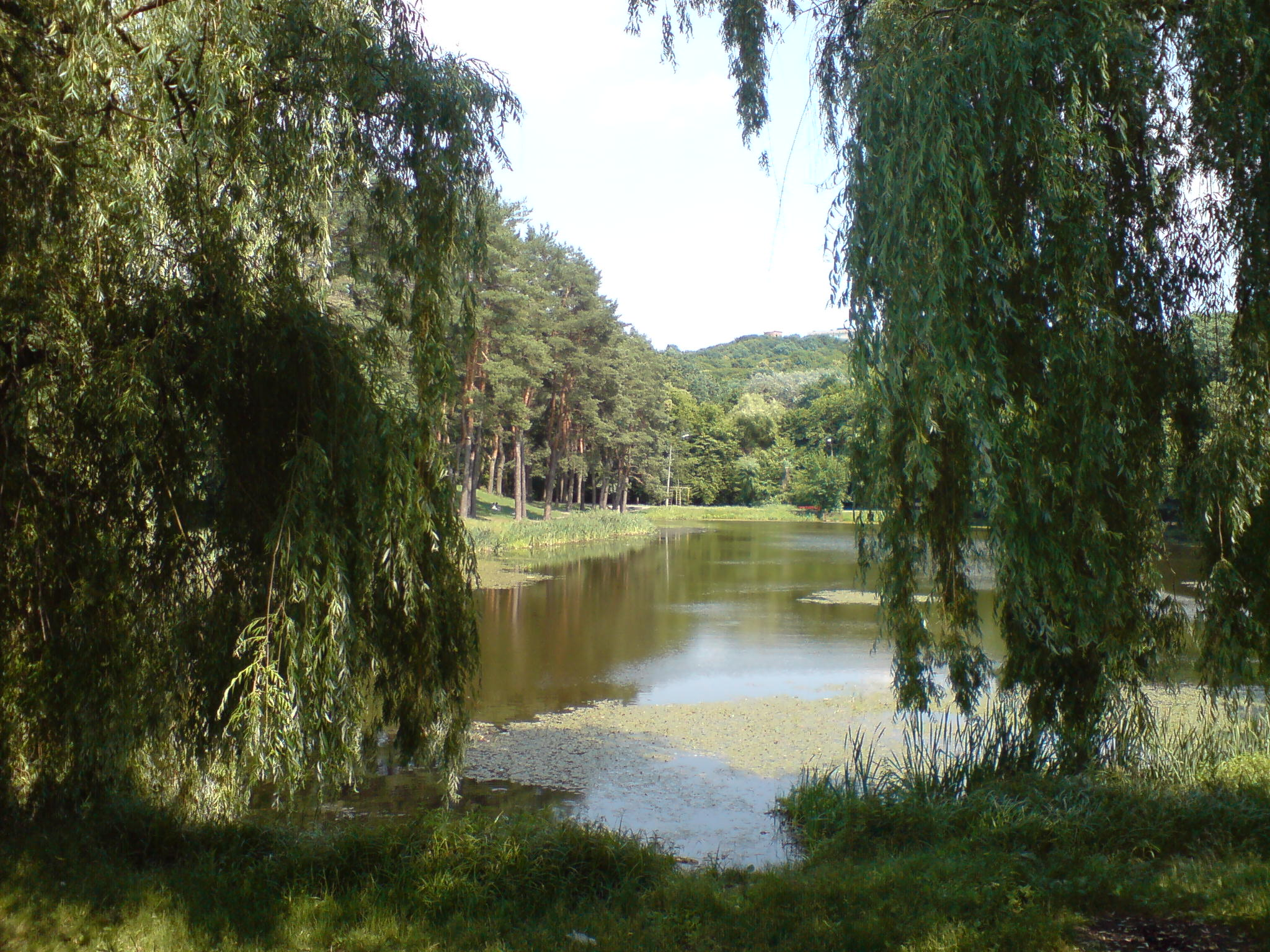 Maksym Rylsky Park in Kiev: Lakes